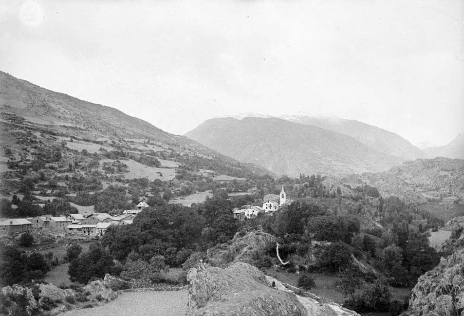 Imatge